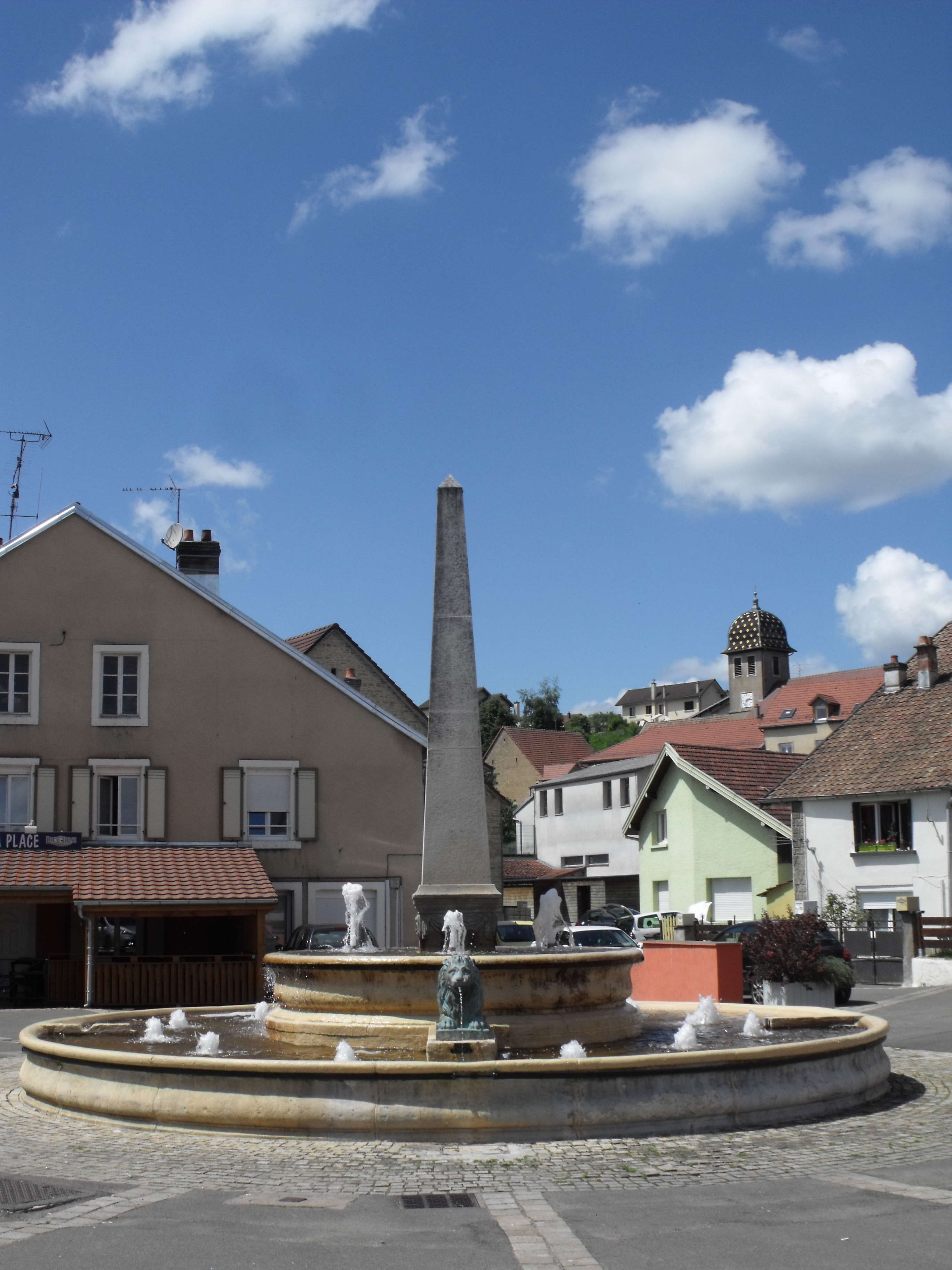 Fontaine et clocher de l'église en fond, à Bavans, Département du Doubs, France